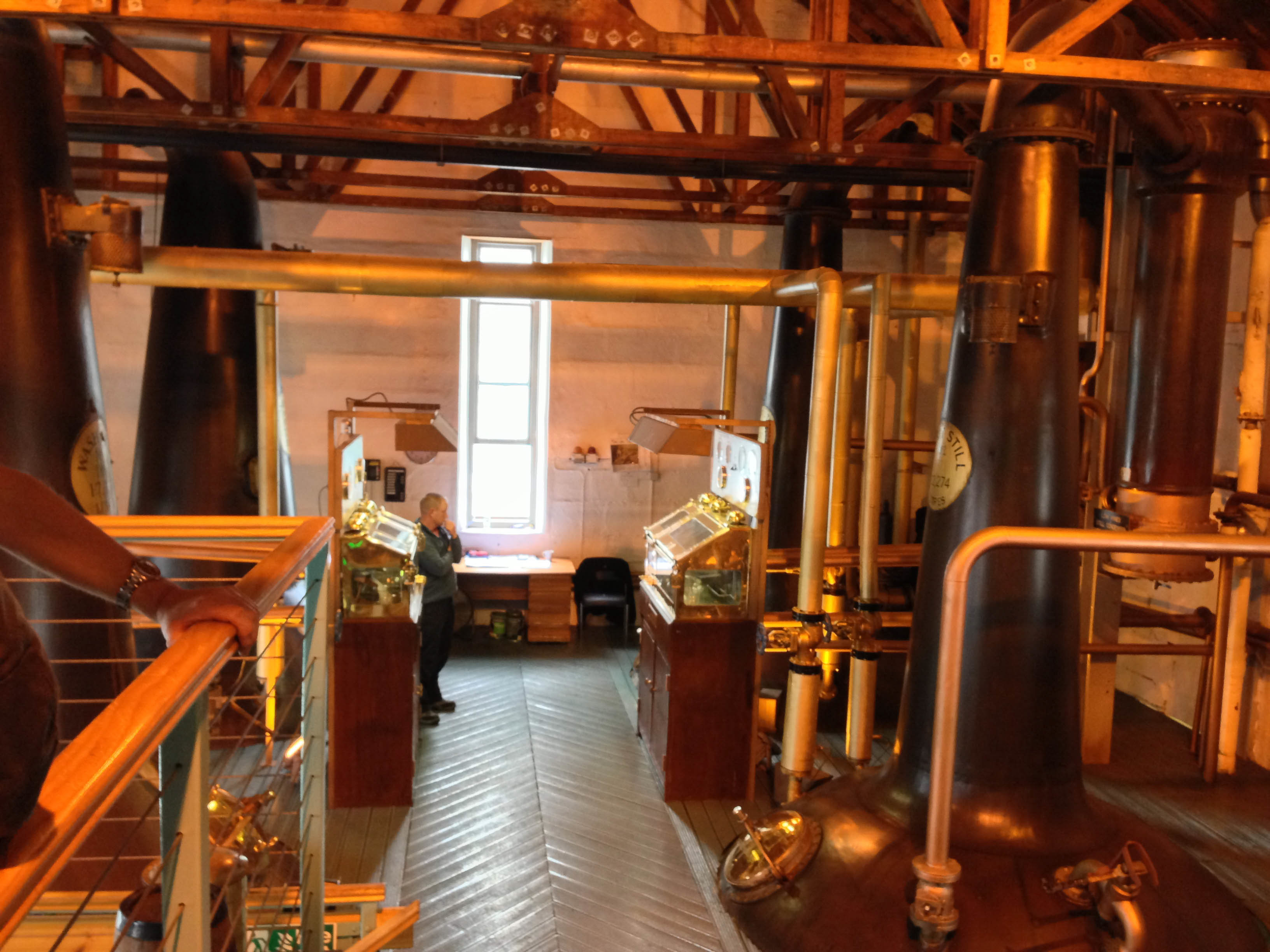 Stills and spirit safe